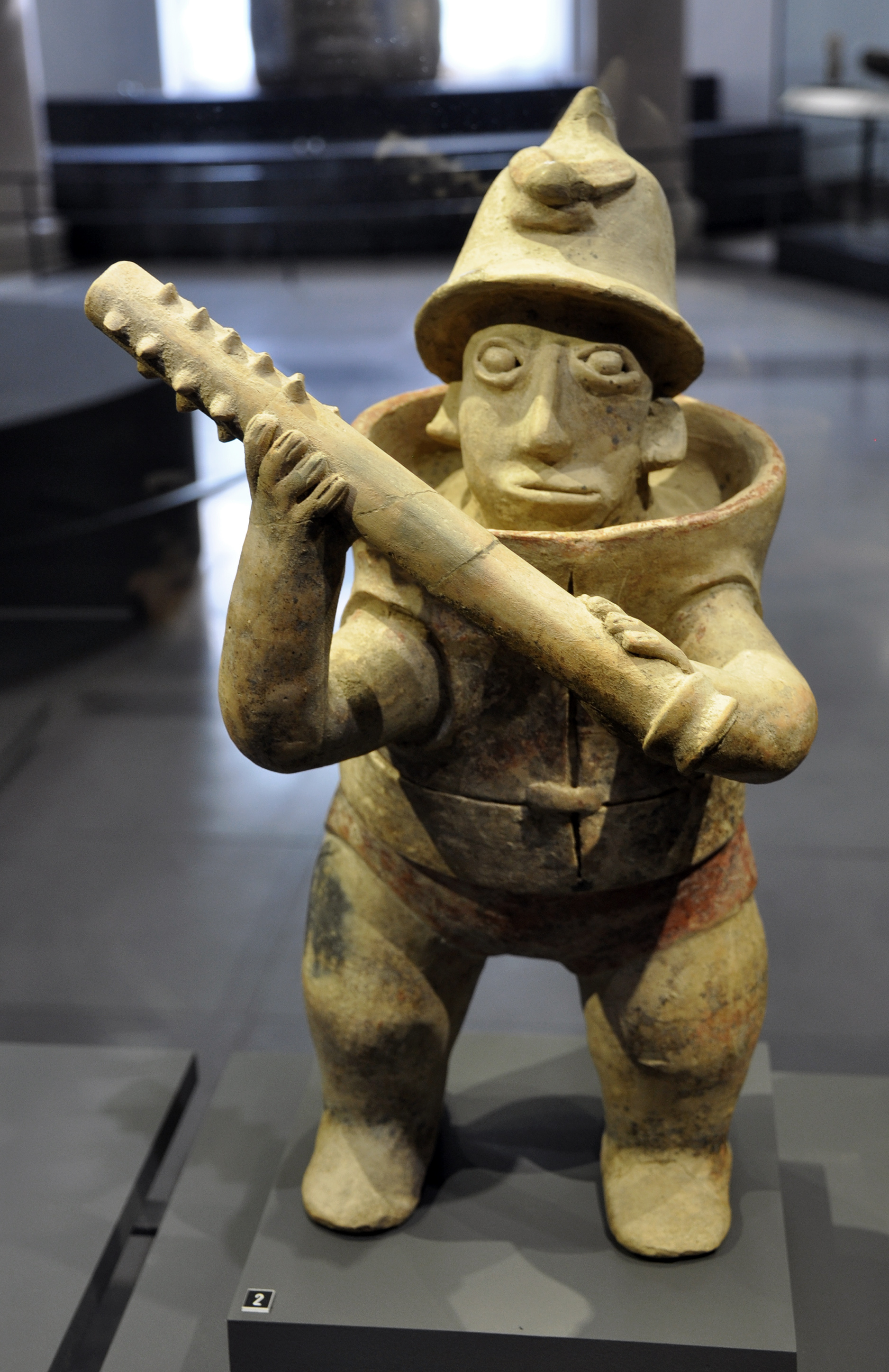 Guerrier armé d'une massue, culture Jalisco, style Ameca-Etzatlan, Préclassique récent à Classique ancien, Mexique occidental, 300 - JC à 300 + JC, terre cuite . Musées Royaux d'Art et d'Histoire (MRAH), Parc du Cinquantenaire, Bruxelles.